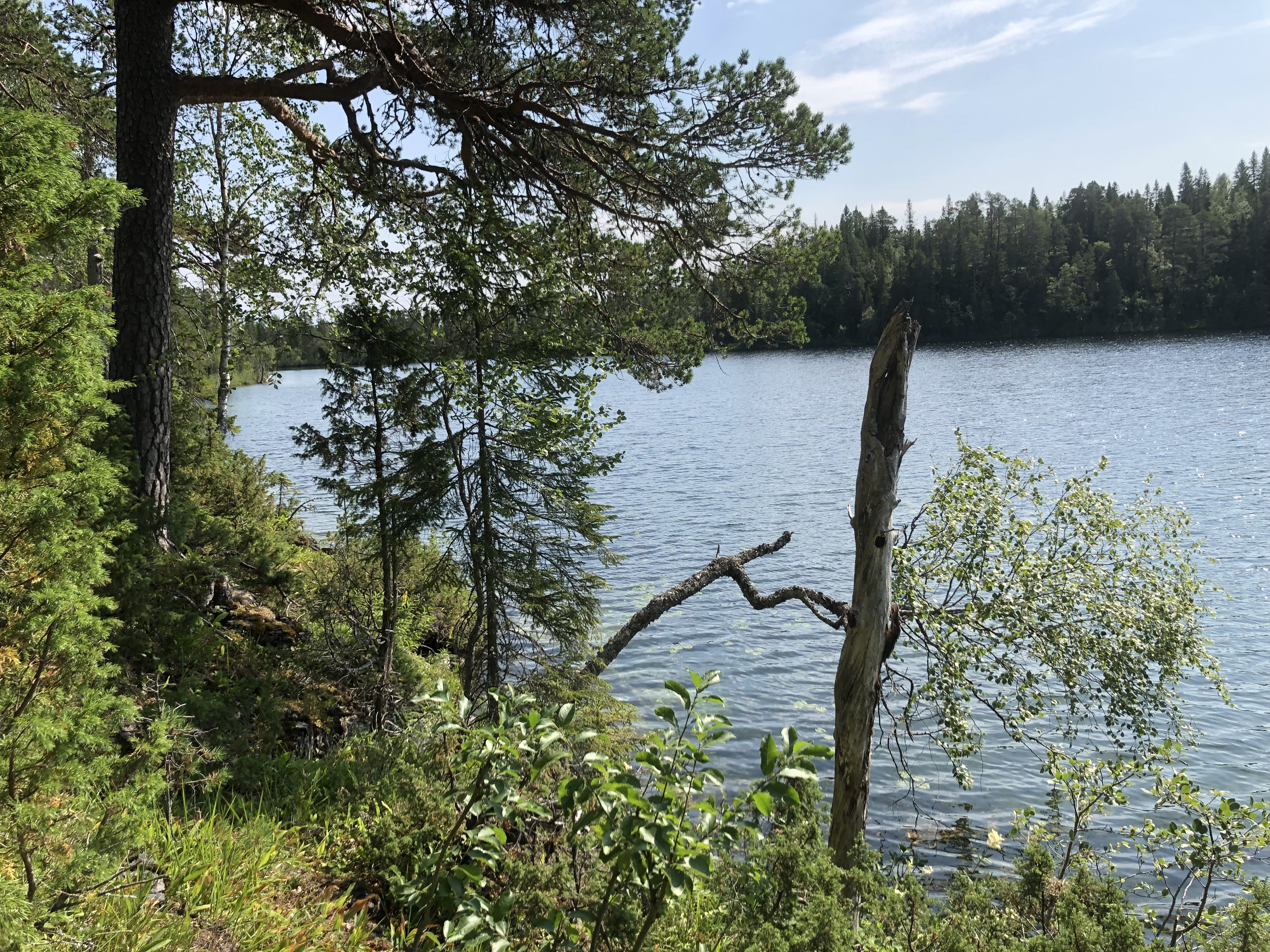 Fra naturreservatet Bergsåsen nær Snåsa sentrum